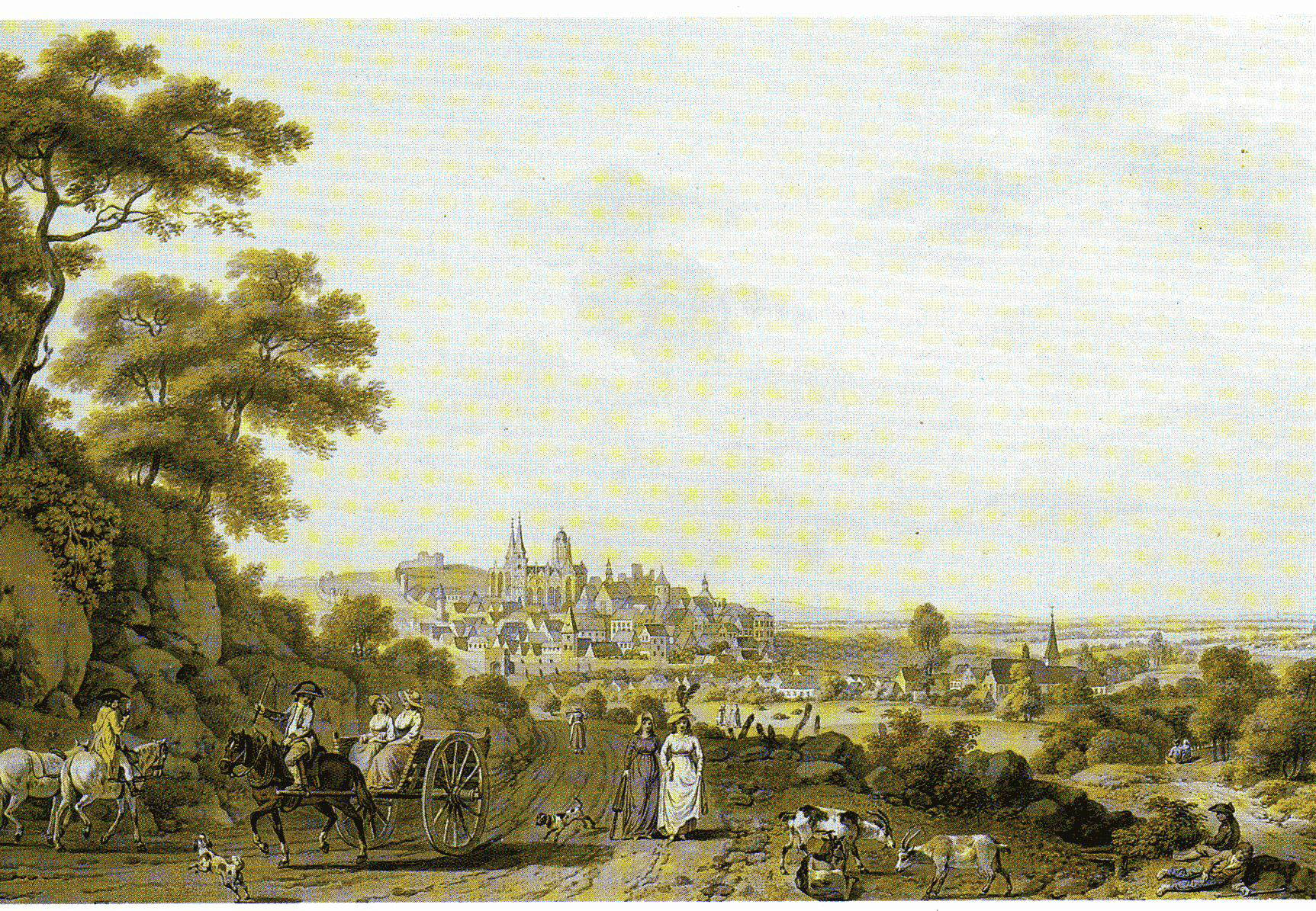 Oppenheim vor der Jahrhundertwende.